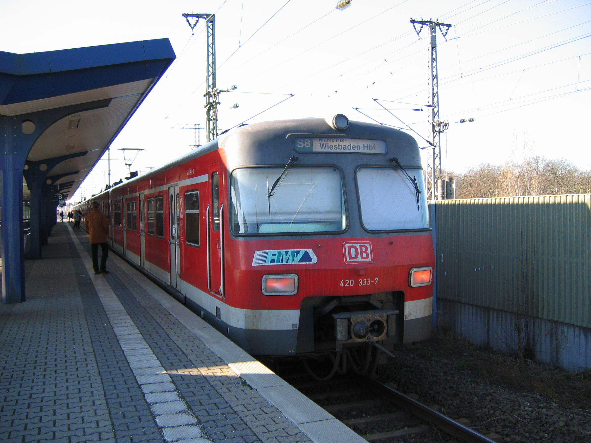 Train type 420 in Offenbach am Main-Ost, Germany, line S8 to Wiesbaden, platform 3 / Baureihe 420 in Offenbach am Main-Ost, Linie S8 nach Wiesbaden, Gleis 3